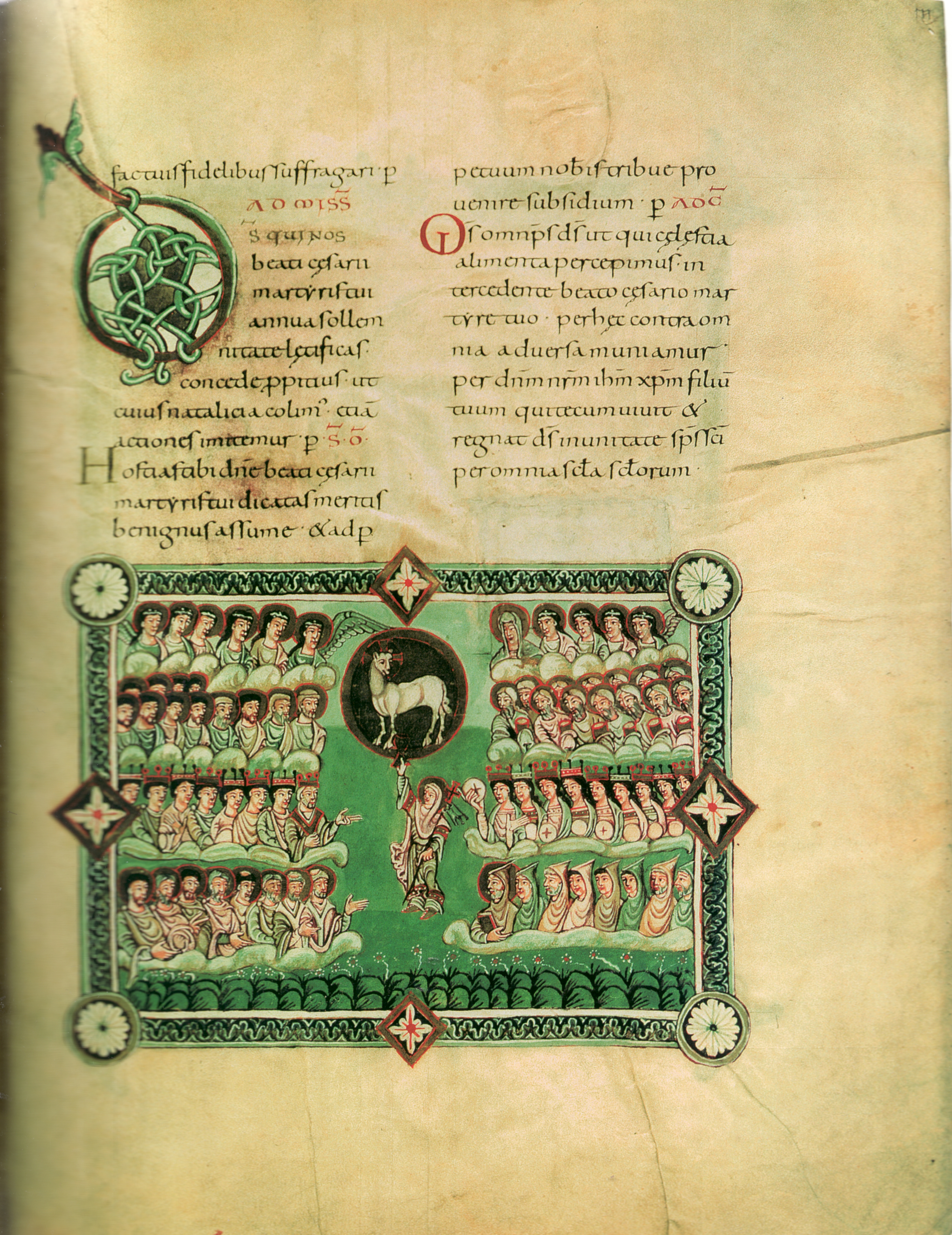 Göttinger Sakramentar (Niedersächsische Staats- und Universitätsbibliothek, 2 cod. Ms. theol. 231 Cim.), fol. 111r. Fuldaer Buchmalerei um 975. Allerheiligenbild